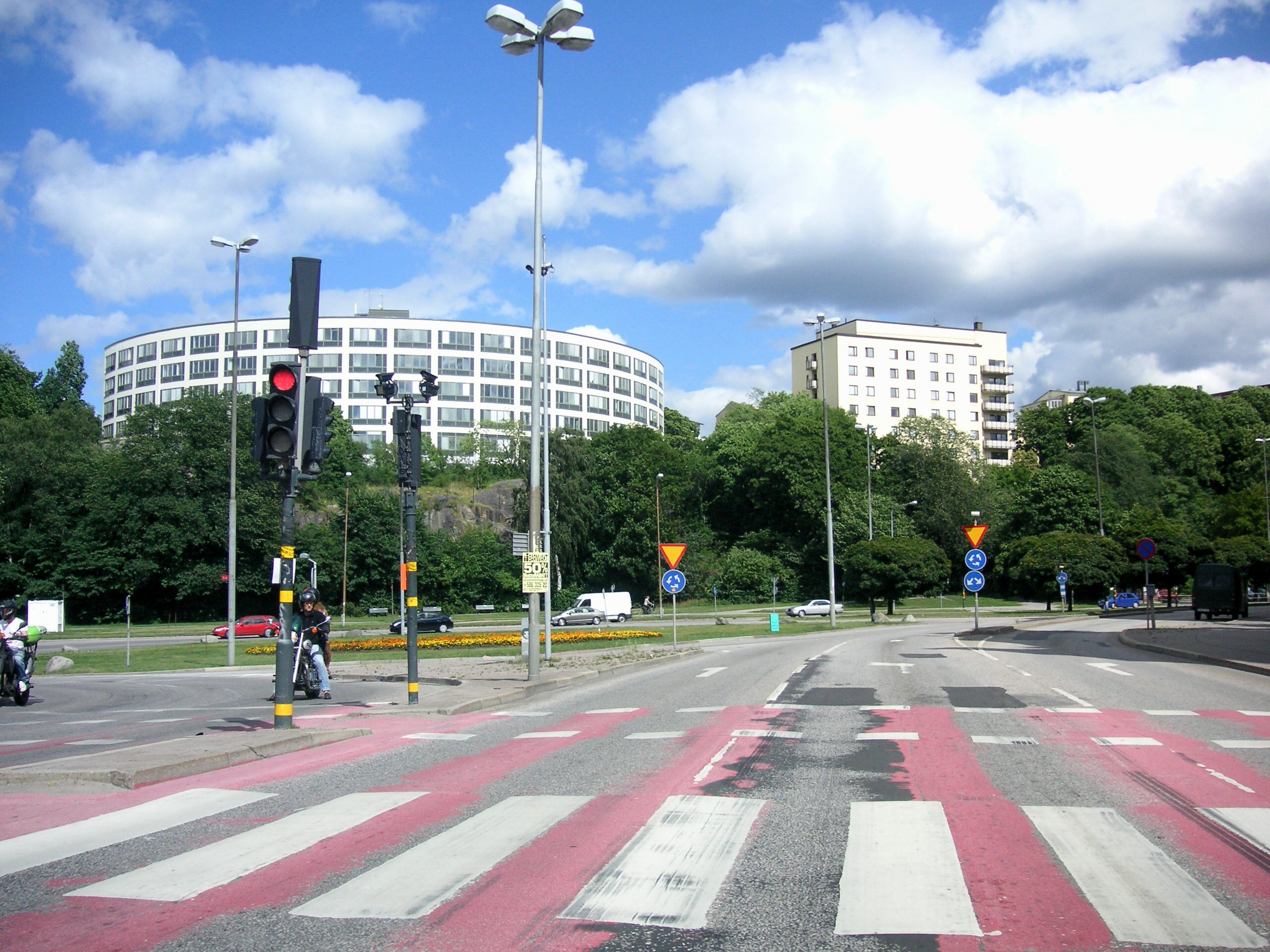 Roslagstull i Stockholm